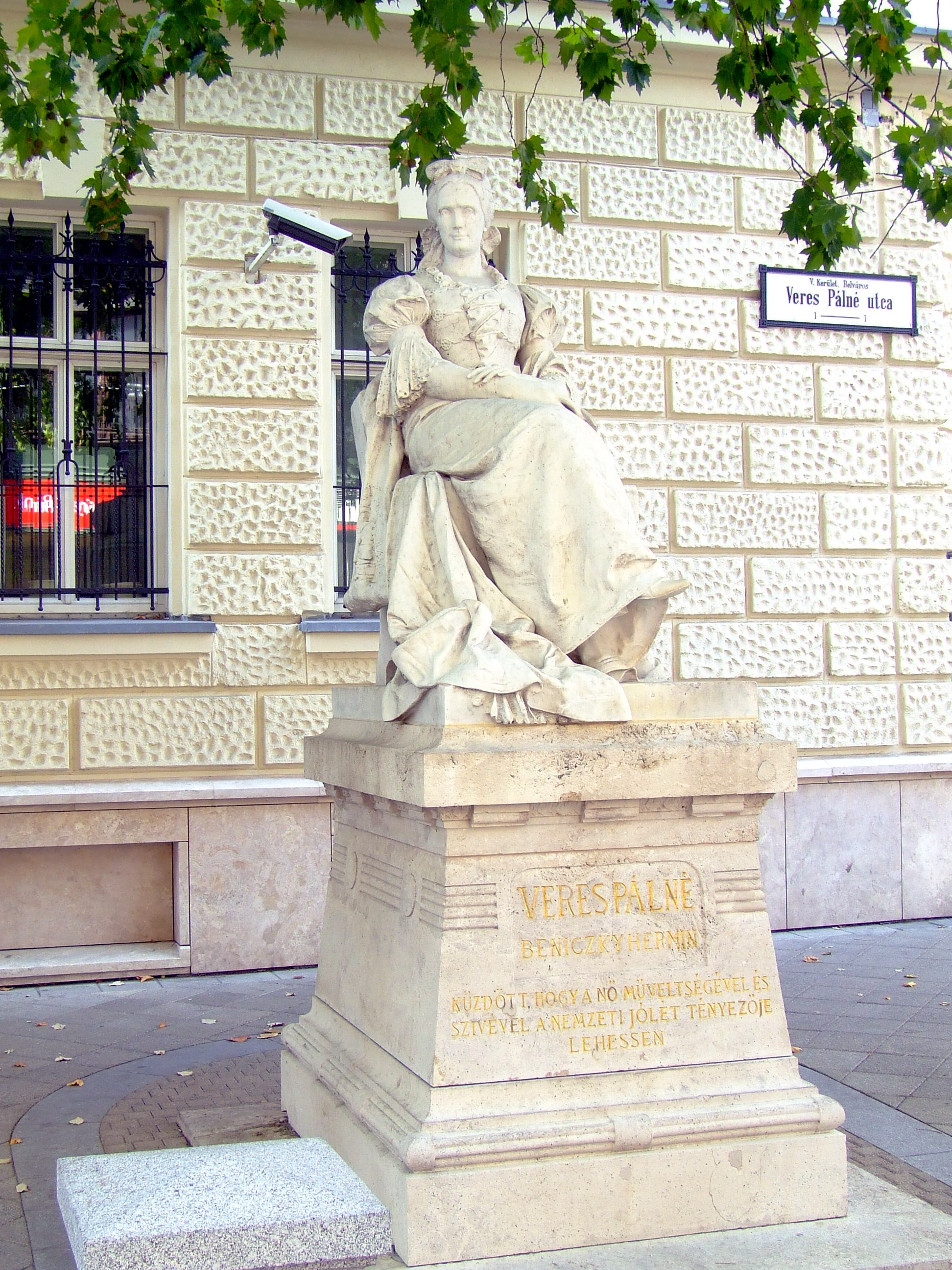 Veres Pálné szobra a Budapesti Veres Pálné utcában (V. kerület). Kiss György szobrászművész alkotása (1906)